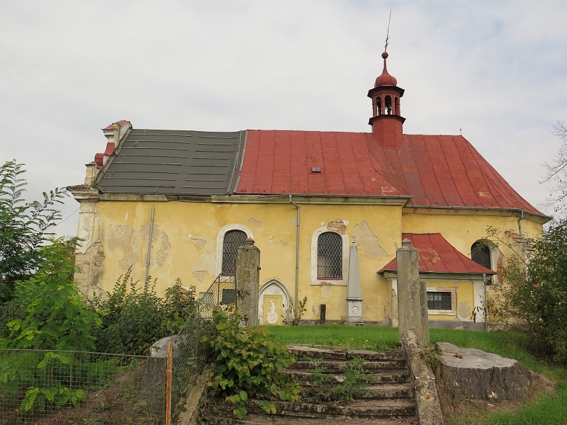 Kostel svatého Štěpána, střed vsi, Řitonice.